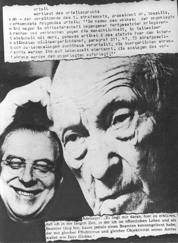 Oberstes Gericht, Globke-Prozess, Fotomontage, Urteil Zentralbild Stolp-23.7.1963 Fotomontage zum Urteil gegen den Judenmörder und Intimus Adenauers, Staatssekretär Globke, der am 23.7.1963 im Namen des Volkes- zur lebenslangen Zuchthaus verurteilt wurde.